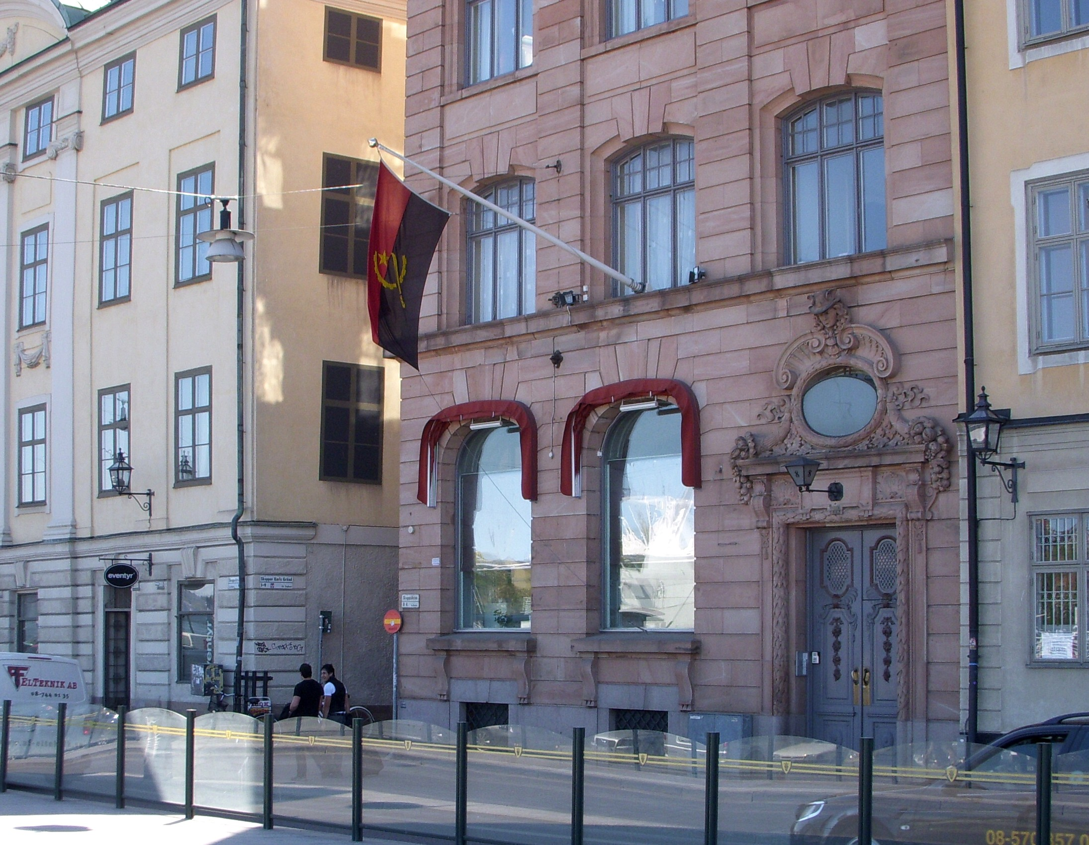 Skeppsbron 8, Gamla stan, Angolas ambassad